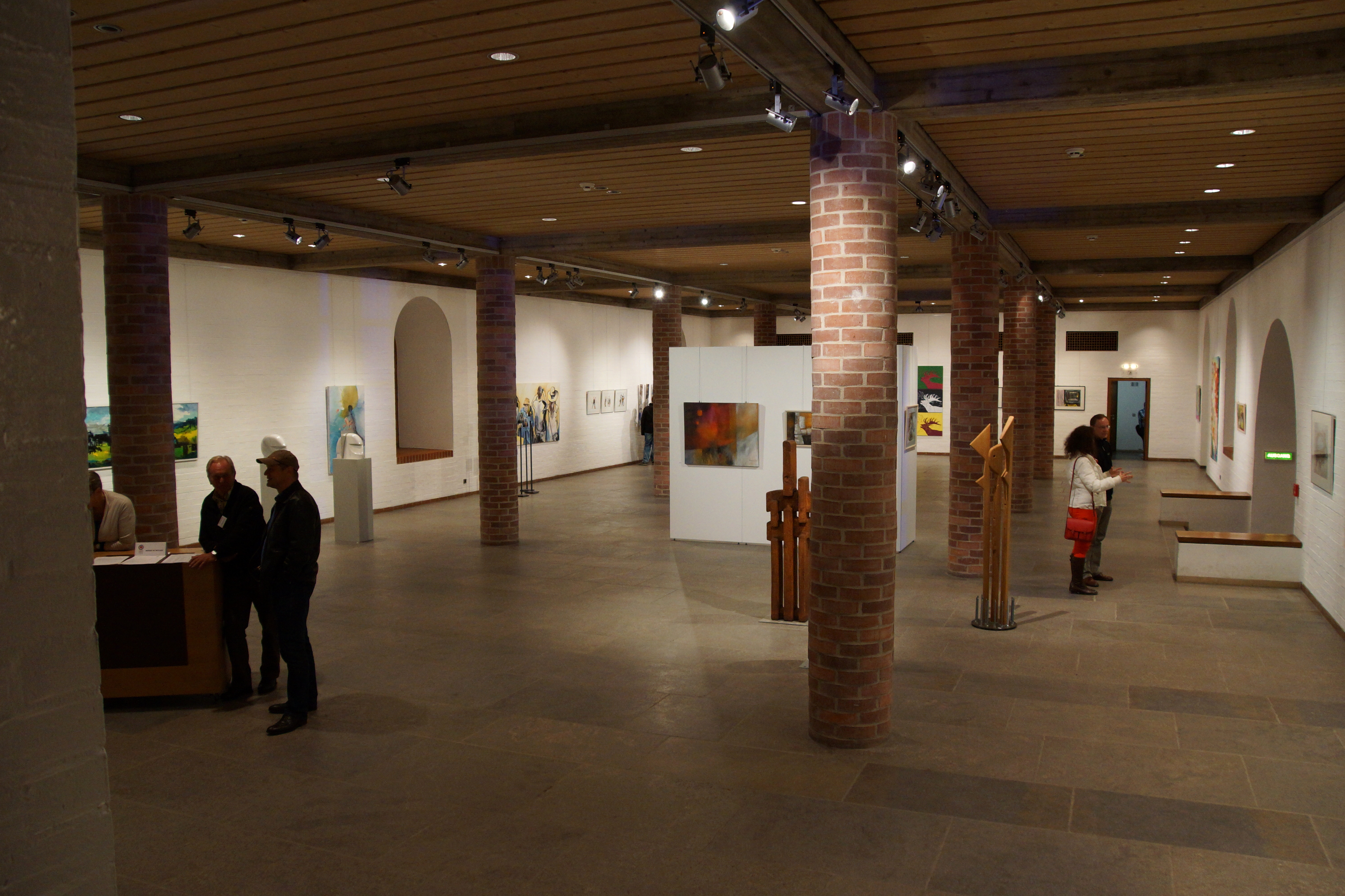 Das Konzert- und Ausstellungsgebäude der sogenannte Reitstadel in Neumarkt bei der Kulturnacht 2013